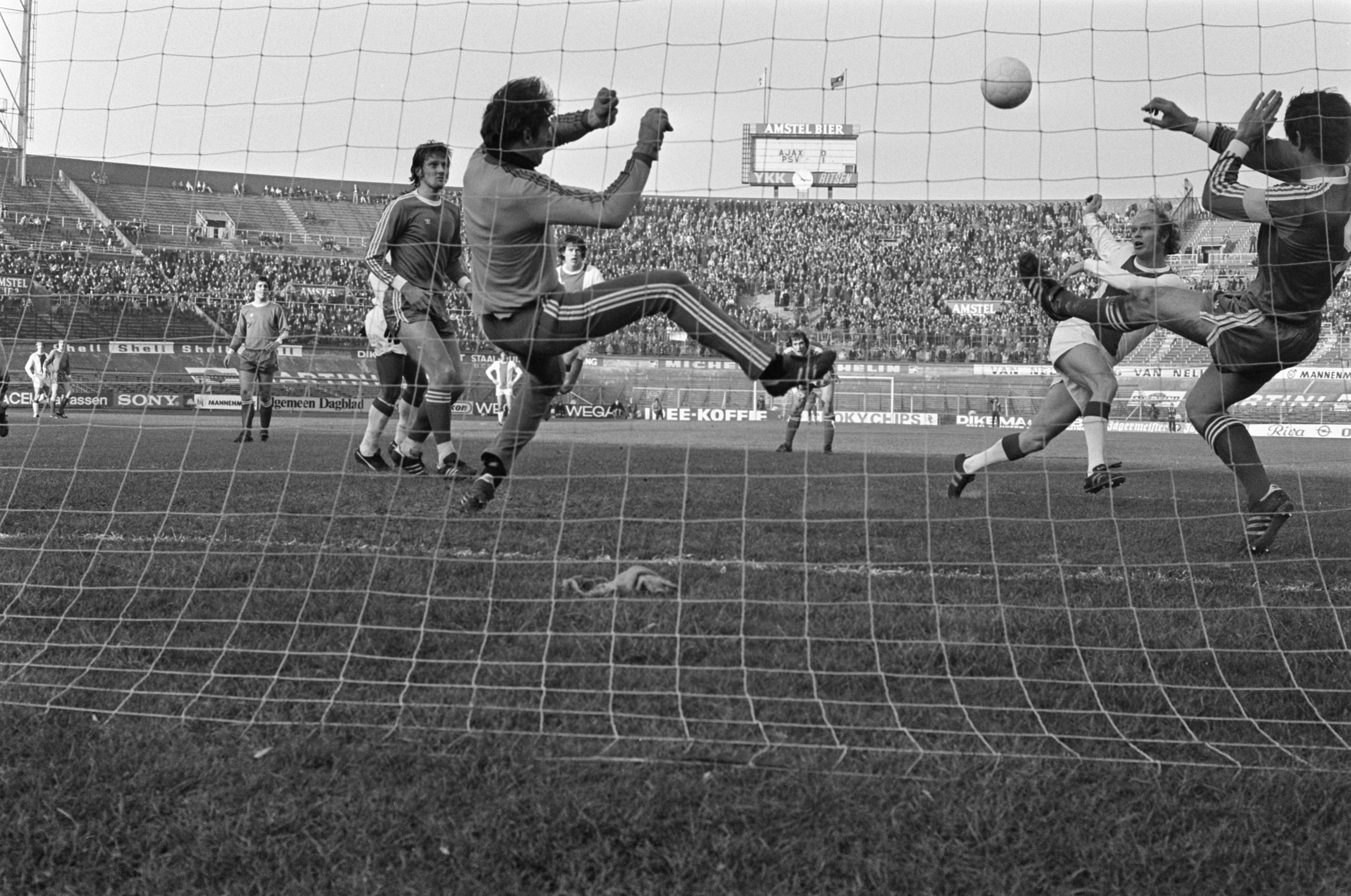 Ajax tegen PSV 1-4, Ruud Geels schiet op doel, Jan van Beveren (l), Van Kraay (r). Datum 4 december 1977